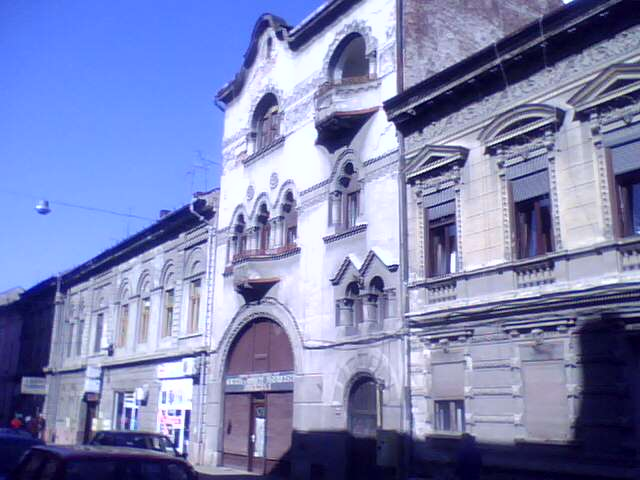 Clădirea Diecezanei.